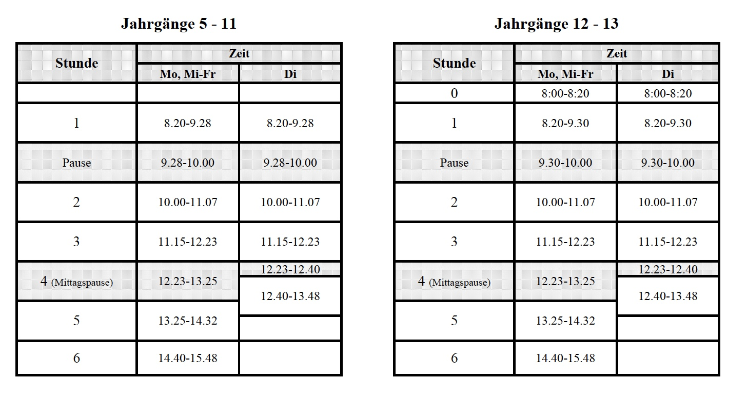 67,5-Minuten-Modell seit dem SJ 2018/2019